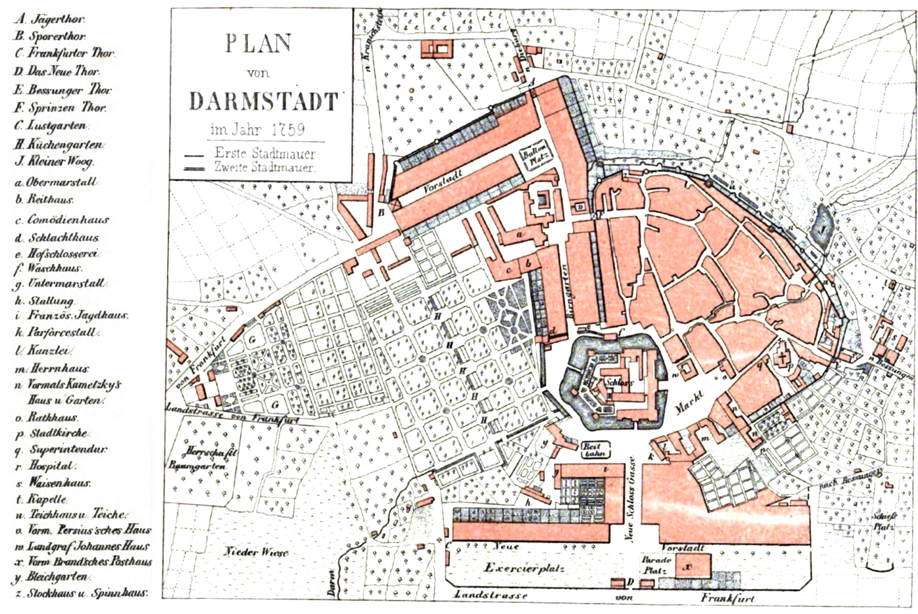 Stadtplan von Darmstadt von 1759Plan der Hochfürstlichen Residenz Darmstadt nebst denen Hochfürstlichen Lust- und Küchengarten (um 1760): Farbiger Stadtplan (46 x 45 cm, Faksimile) und 8 Seiten Erläuterungen von J.R.Wolf